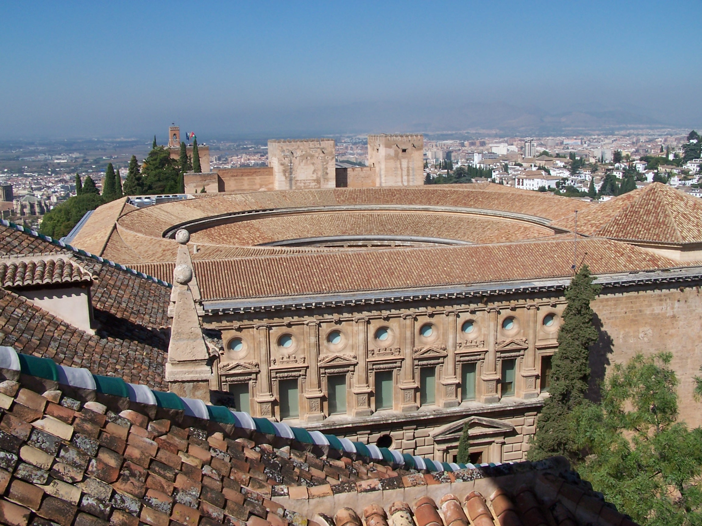 Vista aérea de las cubiertas y fachada del Palacio de Carlos V (Alhambra de Granada, España)